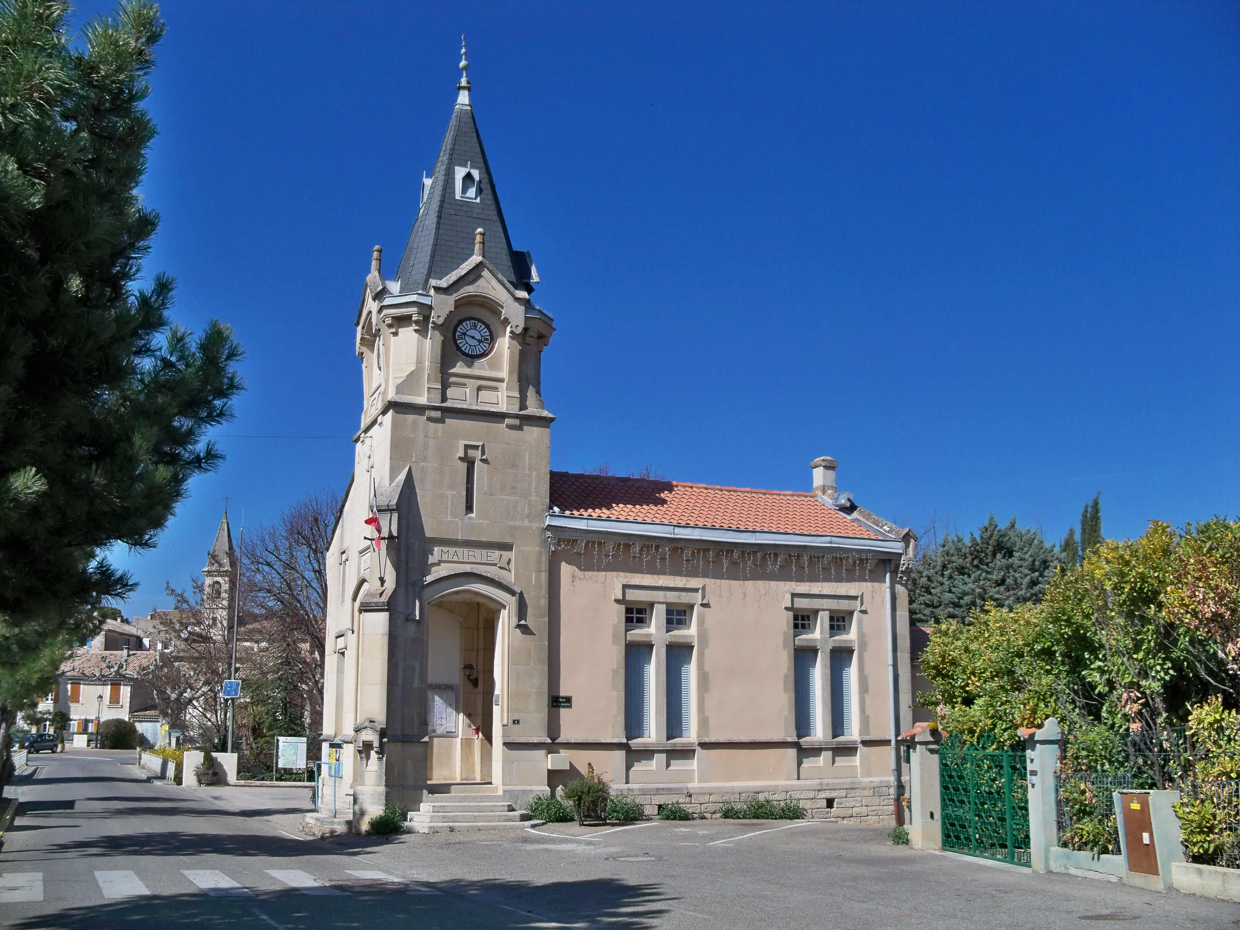 Mairie de Saint Pantaléon (26)